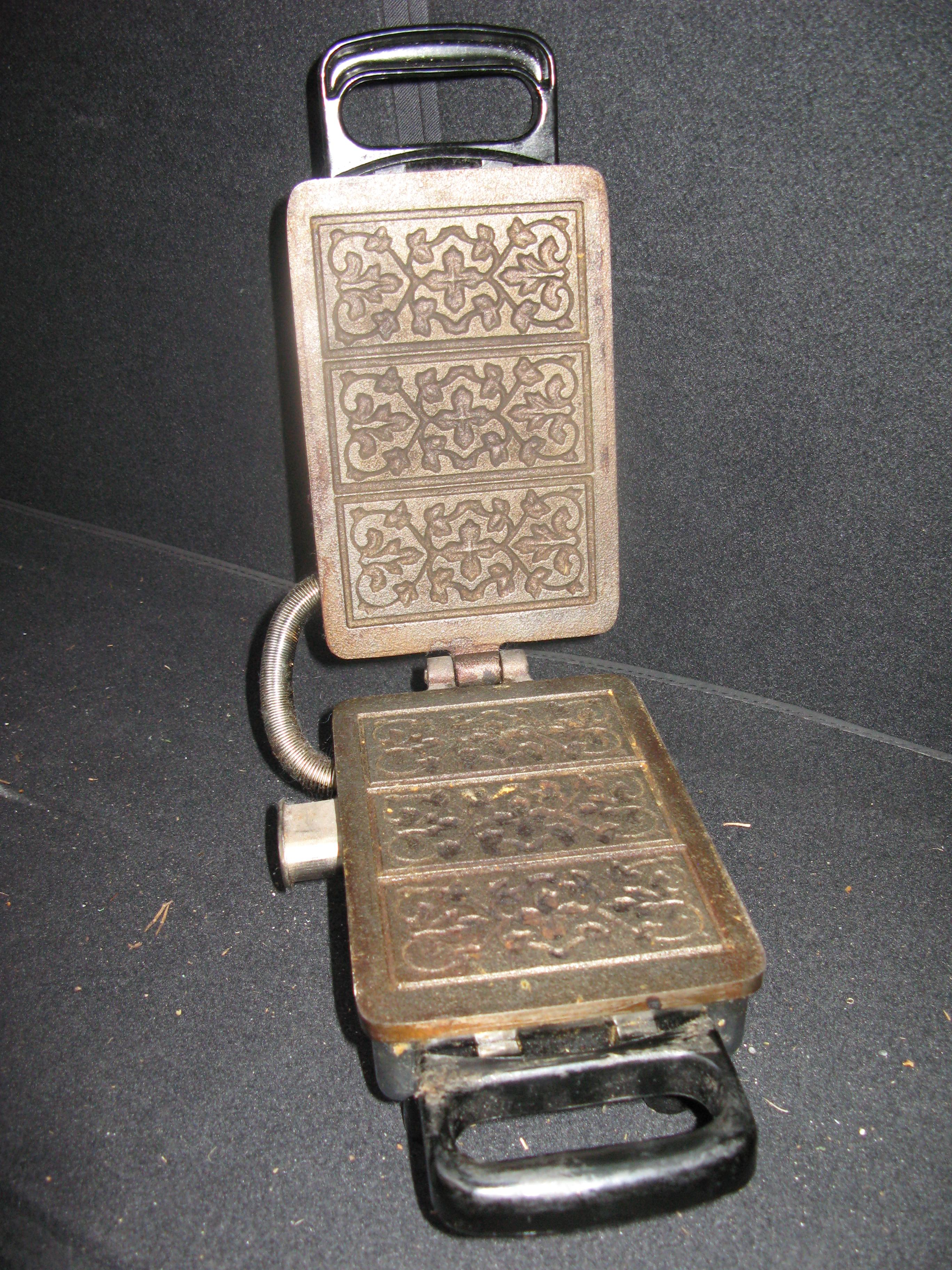 geoeffnetes Goroeisen